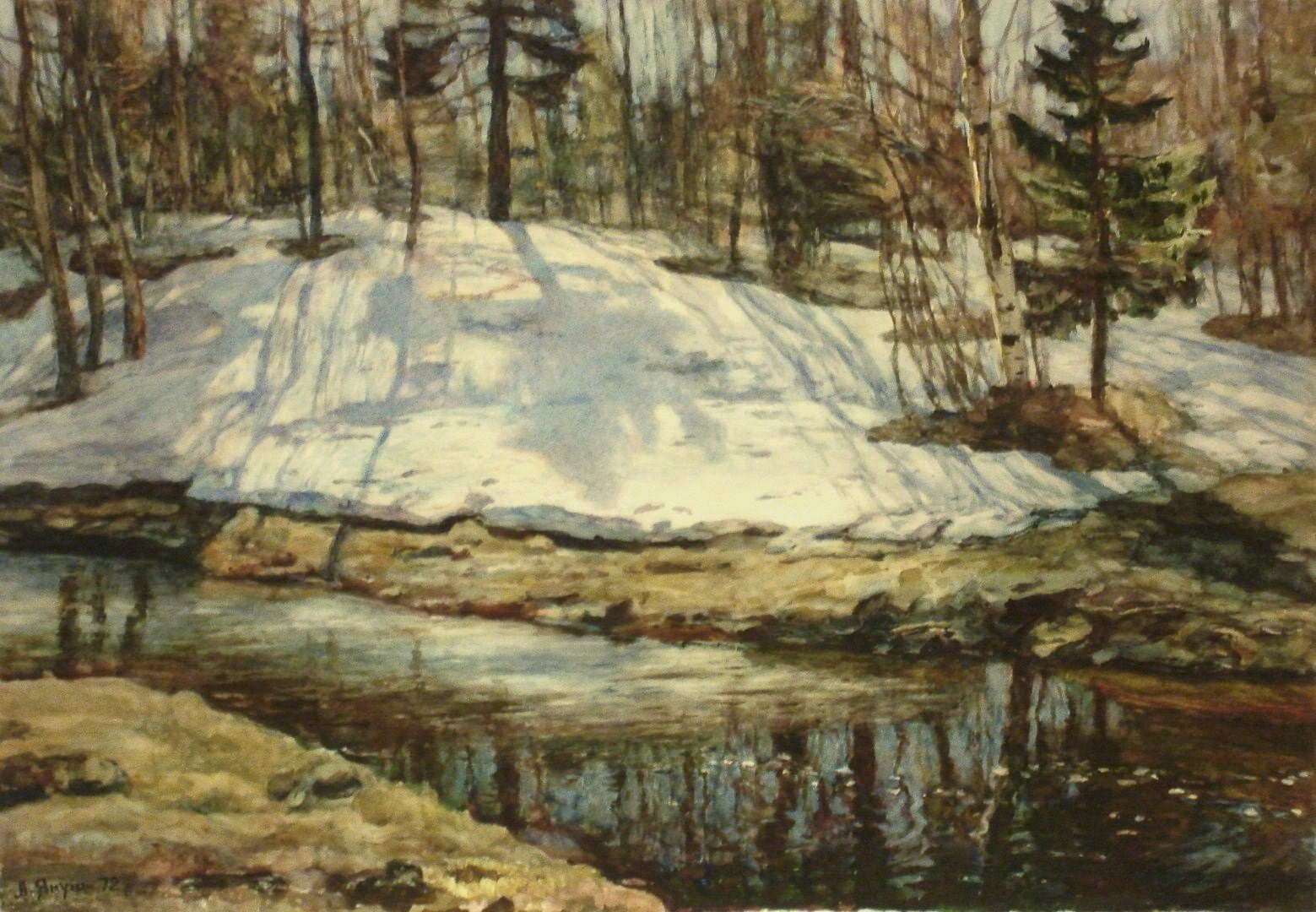 "Black river"